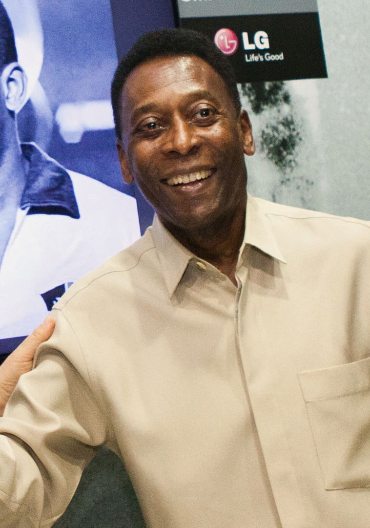 LG전자가 브라질 상파울루시 크레디카드홀(Credicard Hall)에서 6~7일(현지시간) 대규모 신제품 발표회를 열고 55형 올레드TV, 84형 울트라HD TV 등 전략제품을 공개했다. 브라질의 축구영웅 펠레가 행사장을 찾아 브라질법인장 변창범 상무와 인사를 하고 있다.